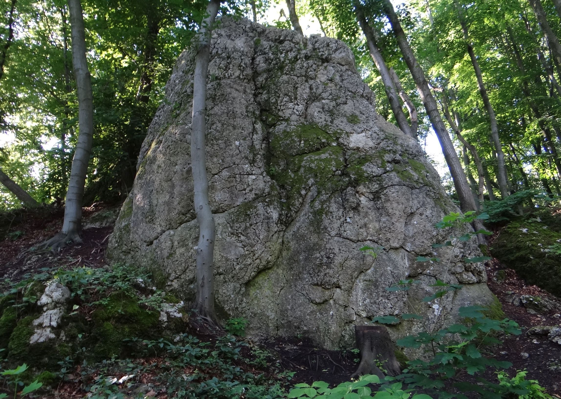 Plaskolec w Lesie Zabierzowskim w Kochanowie